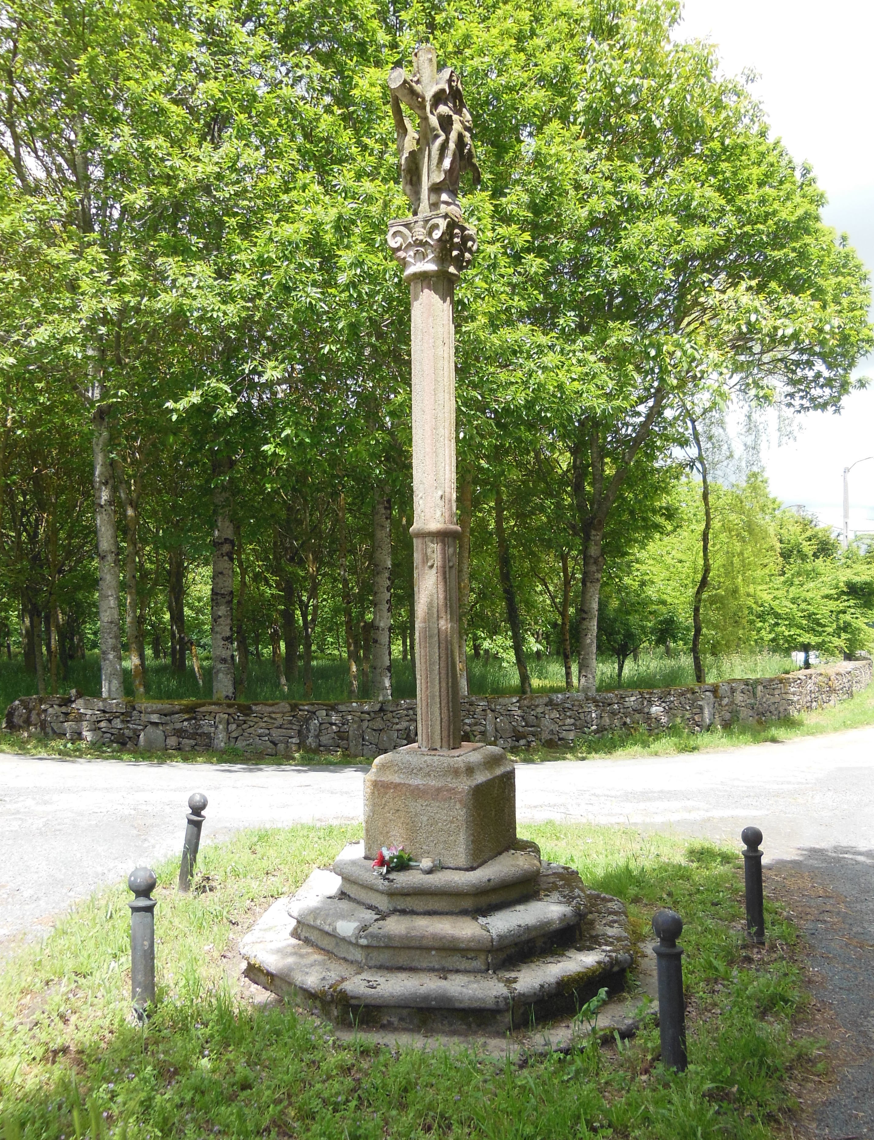 Cruceiro en Amoexa